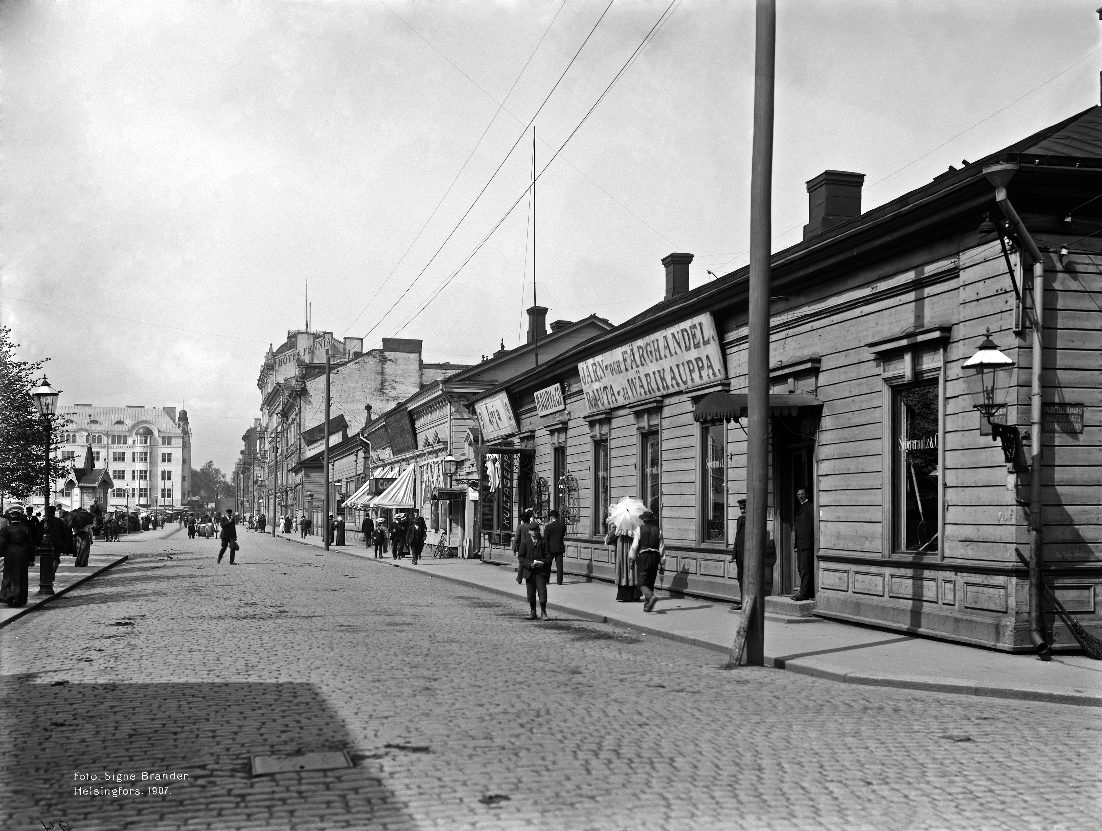 Mikonkatu 9, 11, 13, 15, 17. Vasemmalla Rautatientori. Taustalla Vilhonkatu 9. Mikonkadun 9-13 kivitalot rakennettiin 1911-1928 liike- ja asuintaloiksi matalien puutalojen paikalle. -- negatiivi ja vedos, lasi paperi pahvi, mv